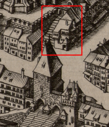 Haus der Spinnwetternzunft Basel auf der Karte "Nova et genuina descriptio inclytae urbis Basileae" von Matthaeus Merian, 1615